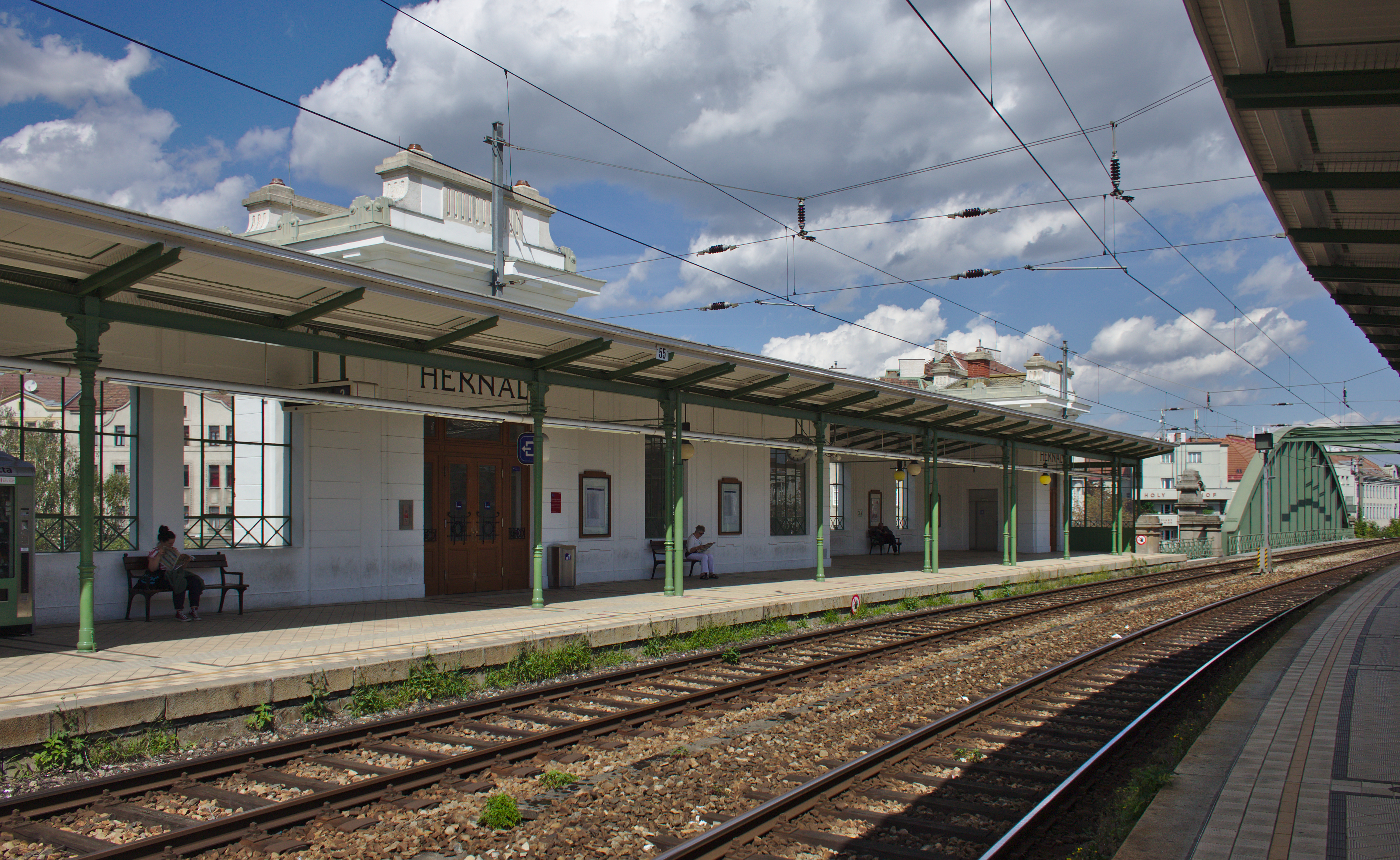 Eisenbahnstrecke, Wiener Vorortelinie - Teilbereich mit Station Hernals